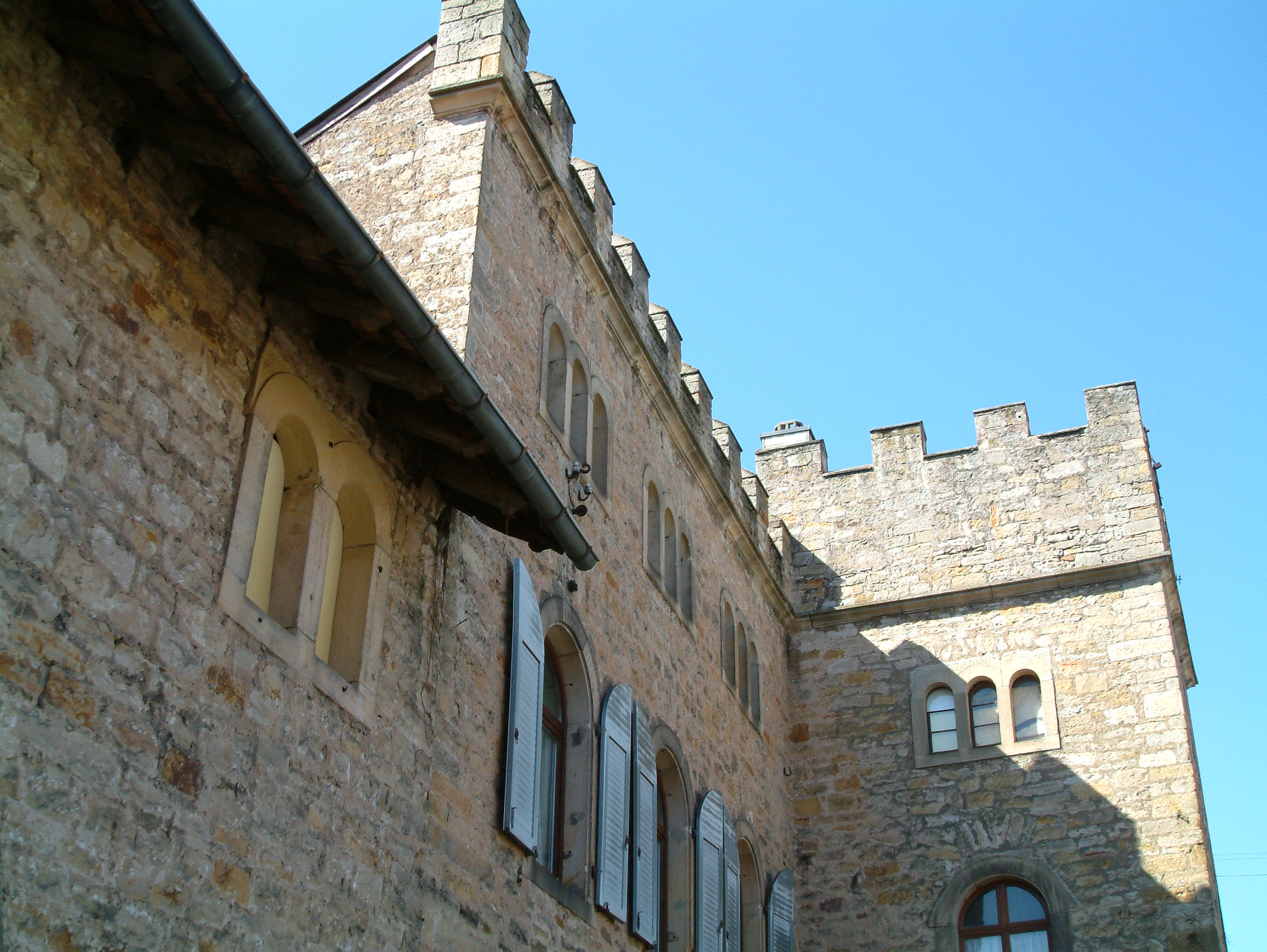 Weißes Haus (historischer Trakt) zu Mußbach, selbst fotografiert am 2006-07-02 und freigegeben durch Benutzer:Mundartpoet